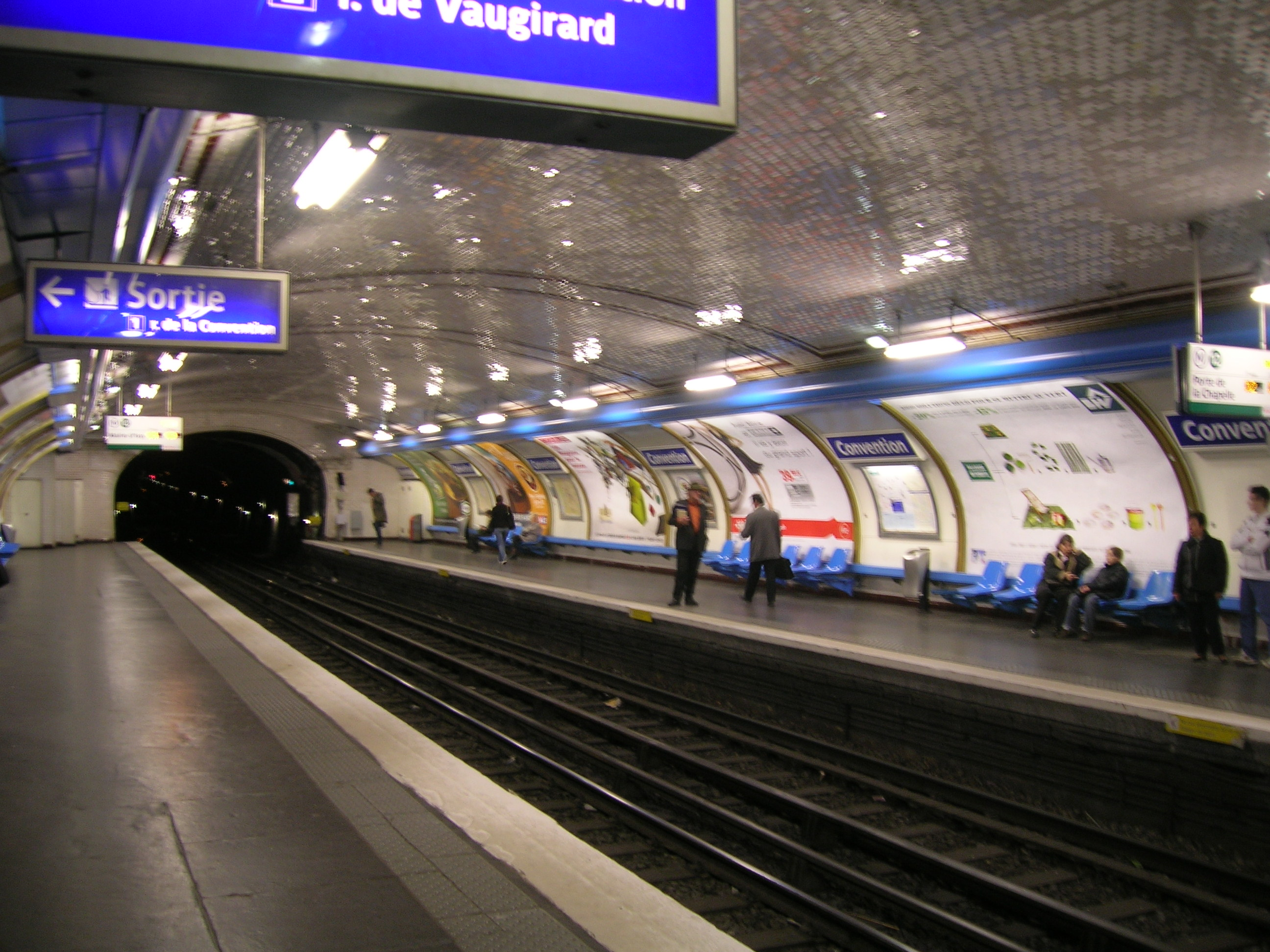 Quais de la station Convention du métro de Paris, ligne 12